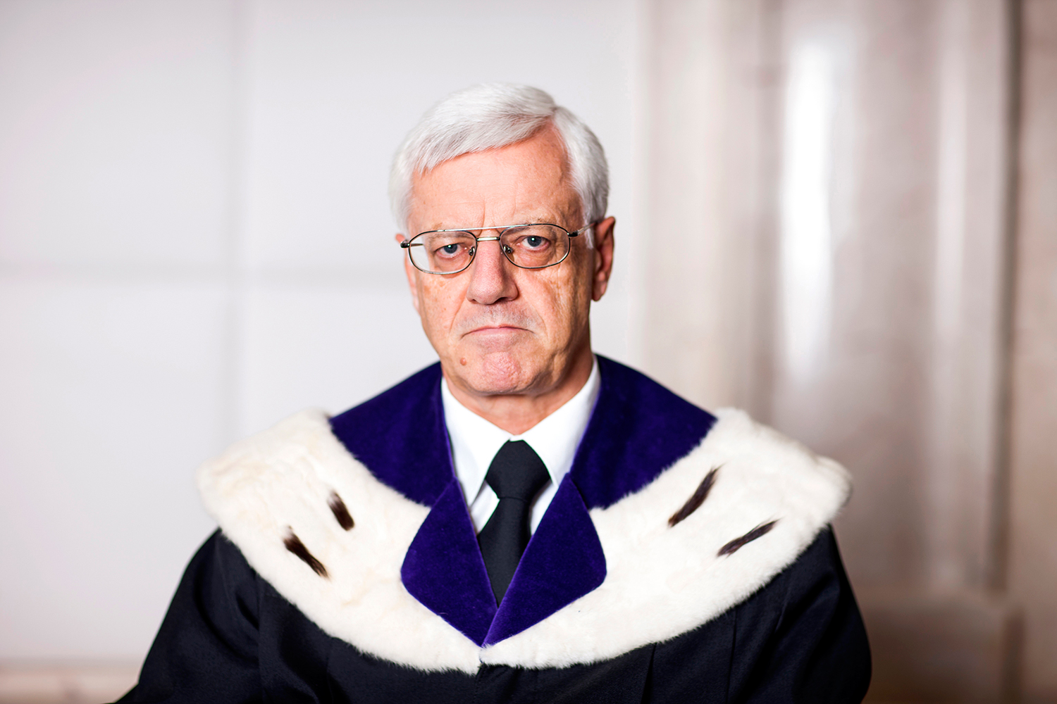 Dr. Gerhart Holzinger, Mitglied des österreichischen Verfassungsgerichtshofs seit 1995, Präsident des VfGH seit 2008.